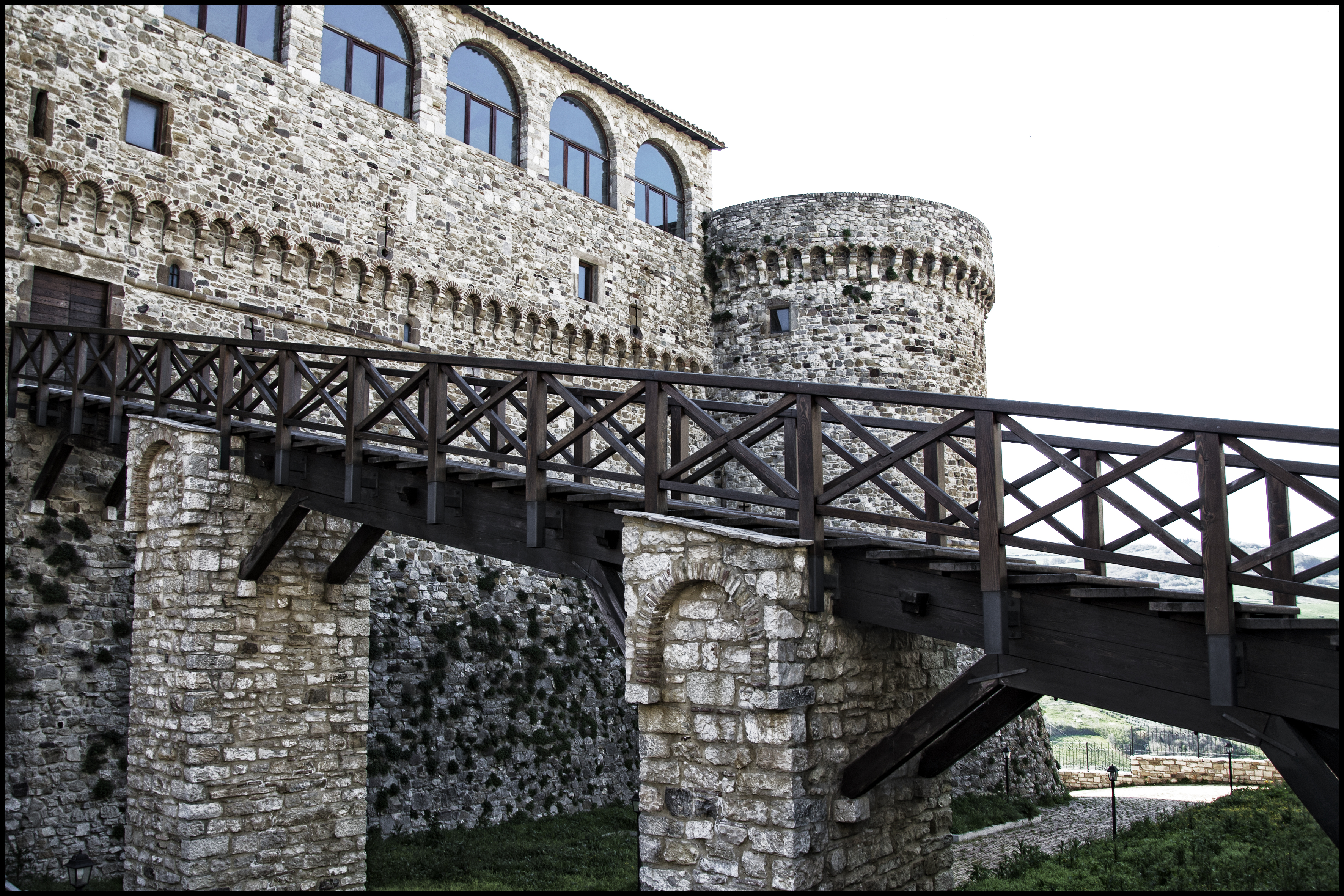 Castello - MIBAC This is a photo of a monument which is part of cultural heritage of Italy.